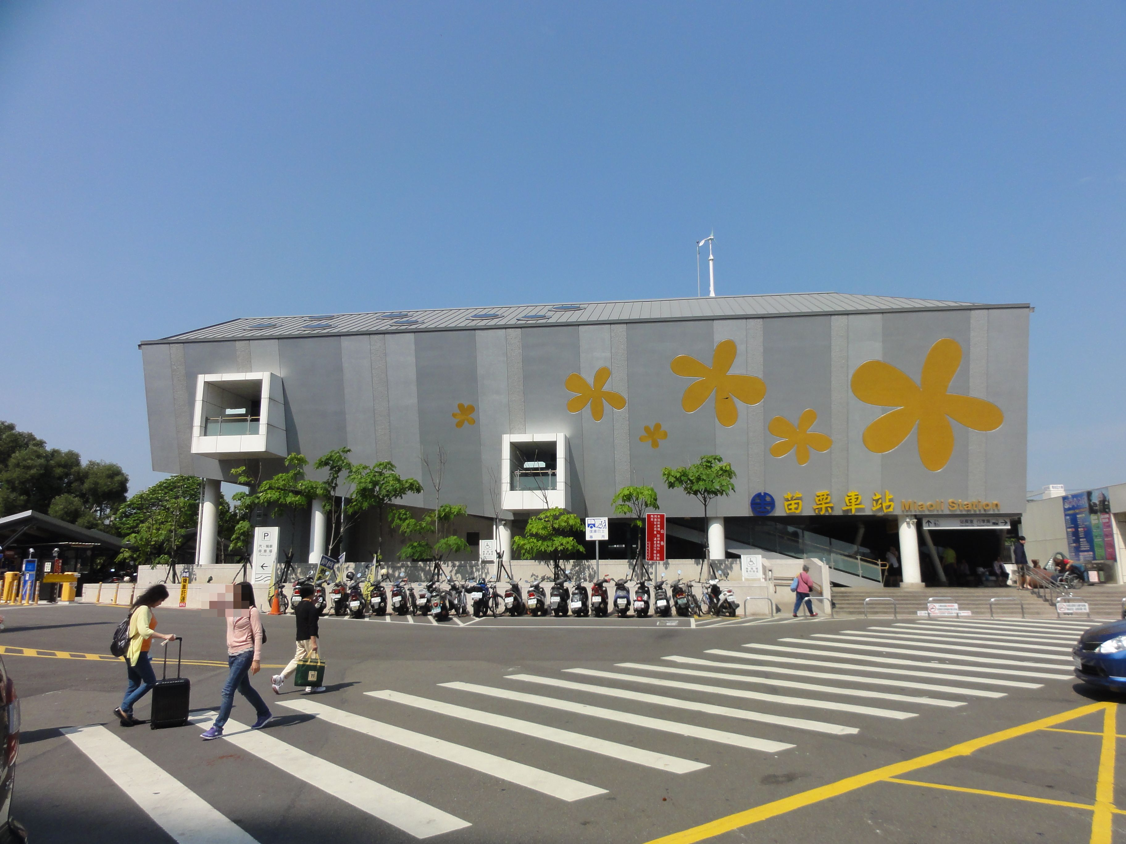 台鉄・苗栗駅 東口